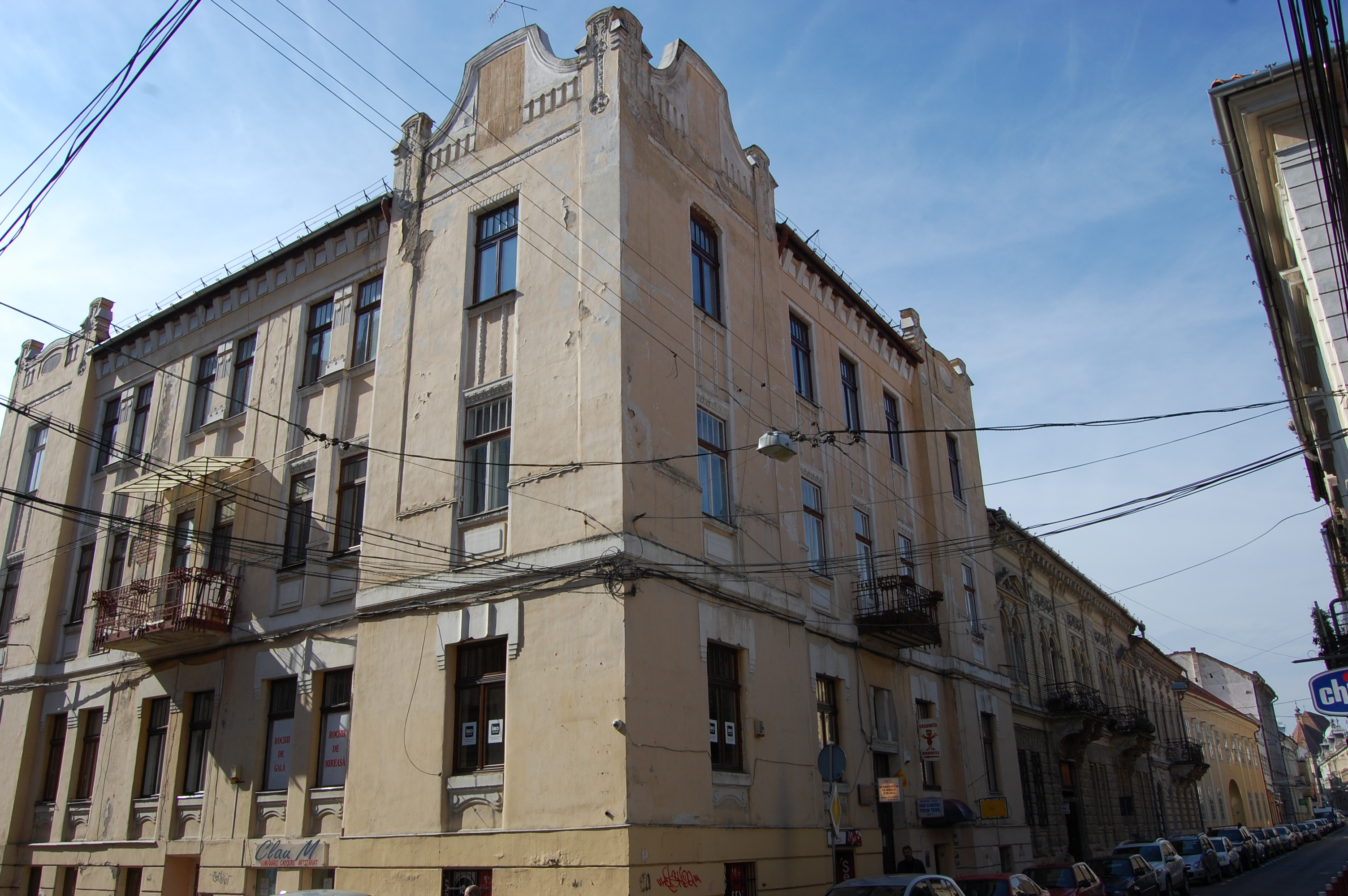 Casă într-o stare deplorabilă